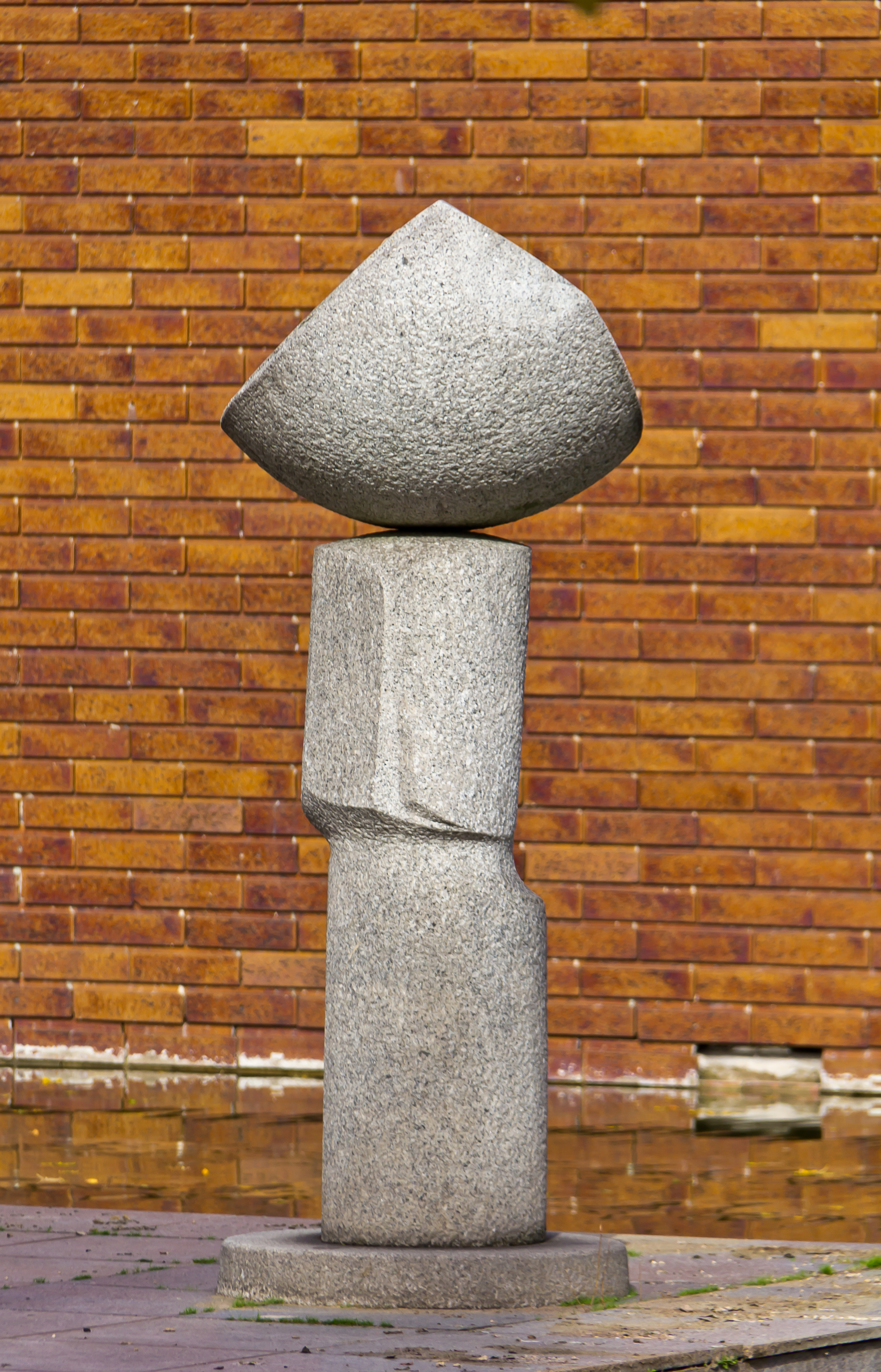 Museum für Ostasiatische Kunst Köln. Ansicht von Südosten mit der Plastik „Fahne im Wind“ von Masayuki Nagare